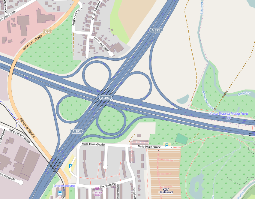 Das Autobahnkreuz Braunschweig-Nord in Niedersachsen.